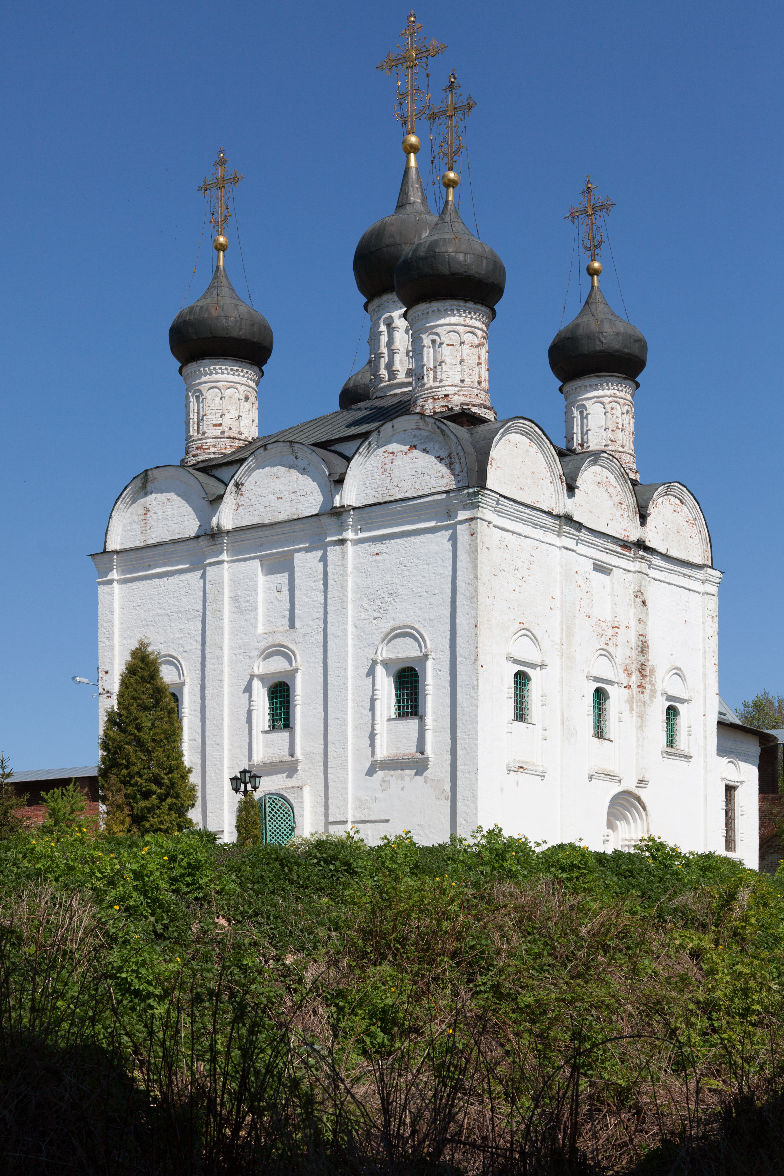 Собор Николая Чудотворца (Москва и Московская область, Зарайск, улица Музейная)